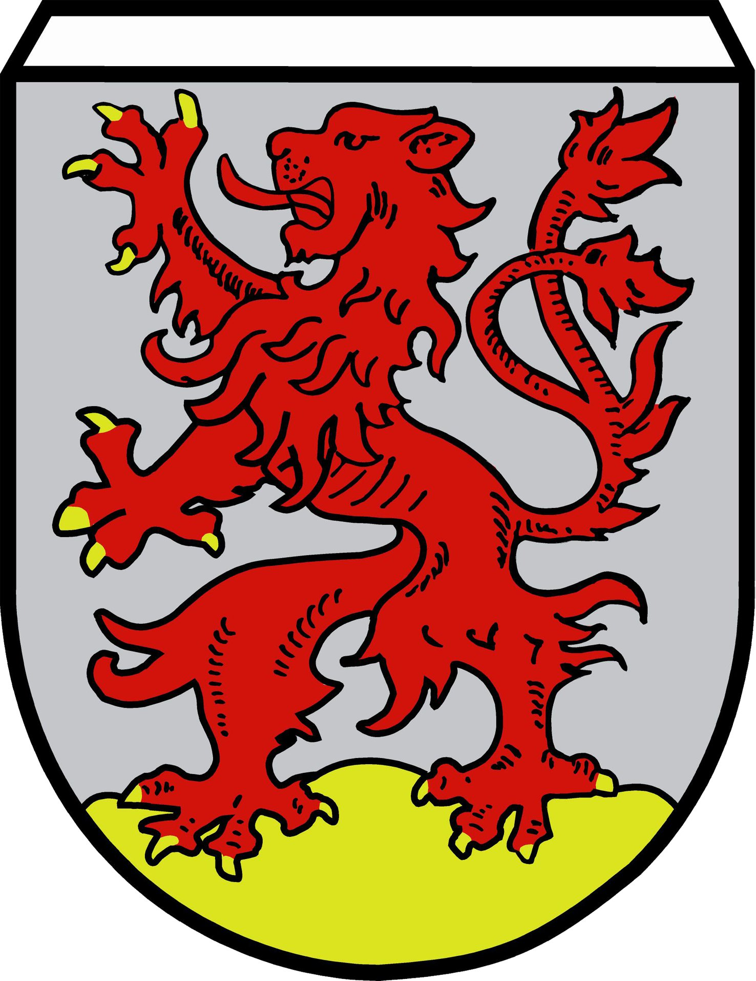 Wappen von Kleinheubach